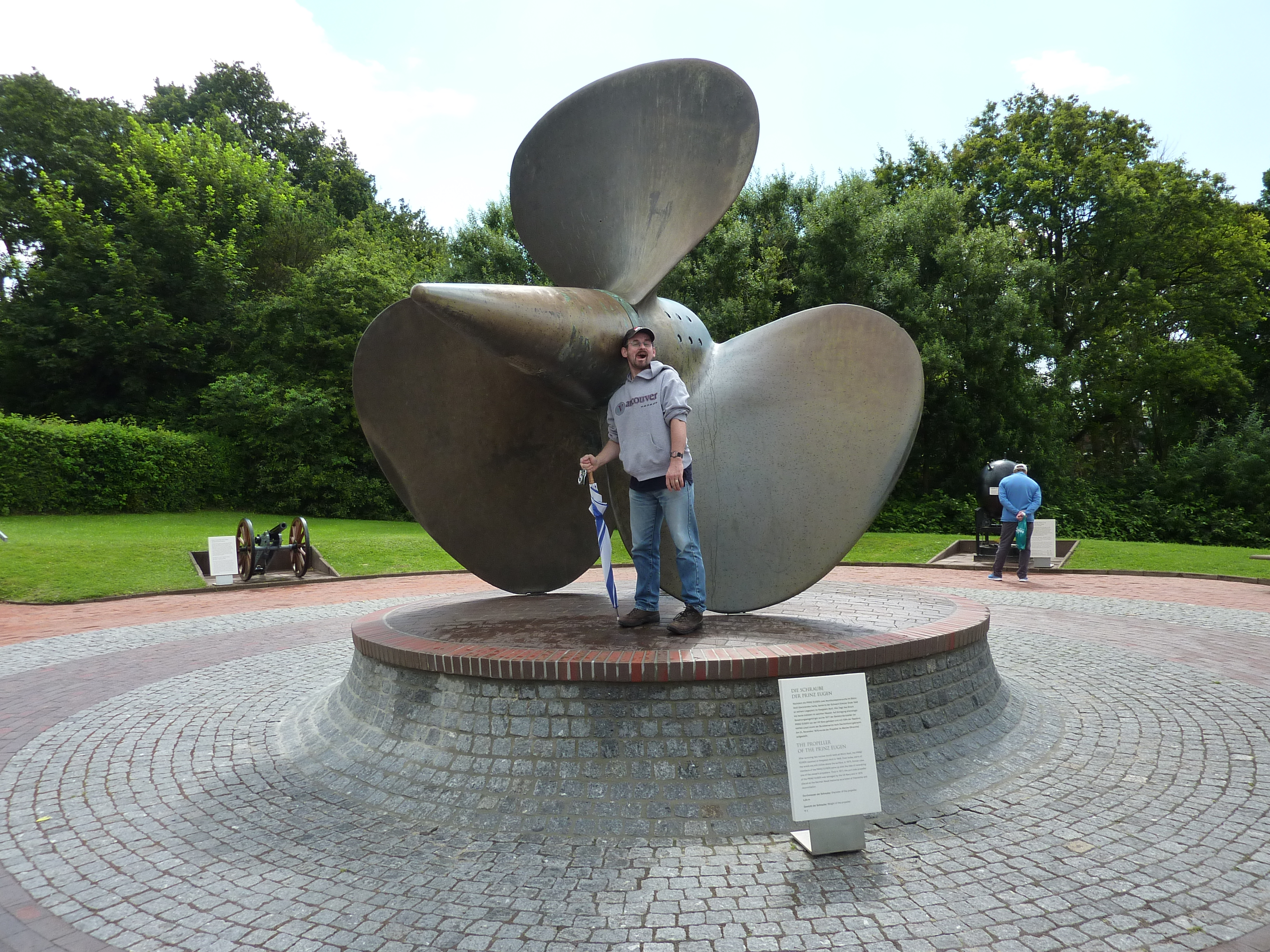 Schraube der Prinz Eugen, aufgestellt auf dem Prinz Eugen Platz am Marineehrenmal Laboe